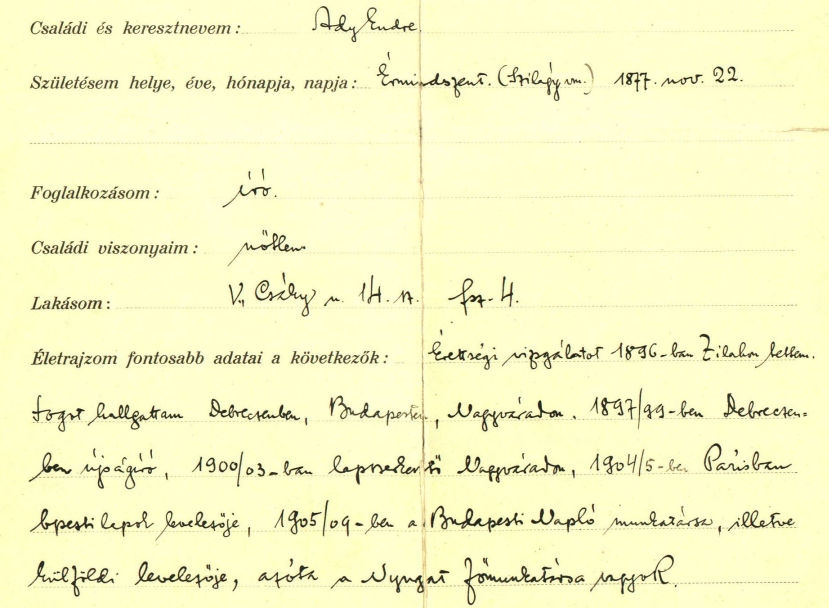 Ady Endre szabadkőműves jelentkezése 1. oldal